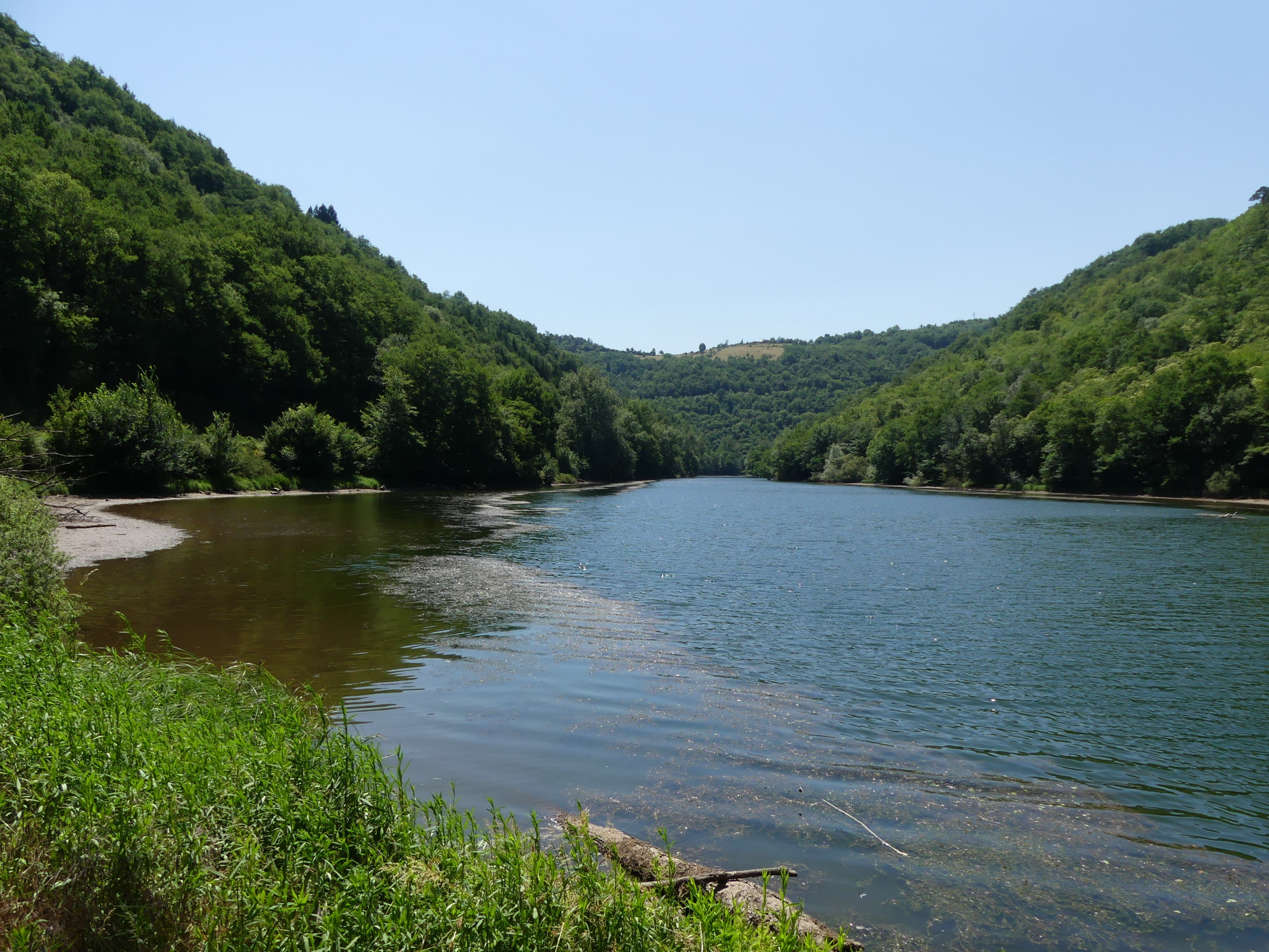 Le Lot dans la retenue du barrage de Golinhac, en limites d'Estaing (à gauche, et au premier plan) et de Sébrazac (à droite, ainsi qu'au fond), Aveyron, France. Vue prise en direction de l'amont.